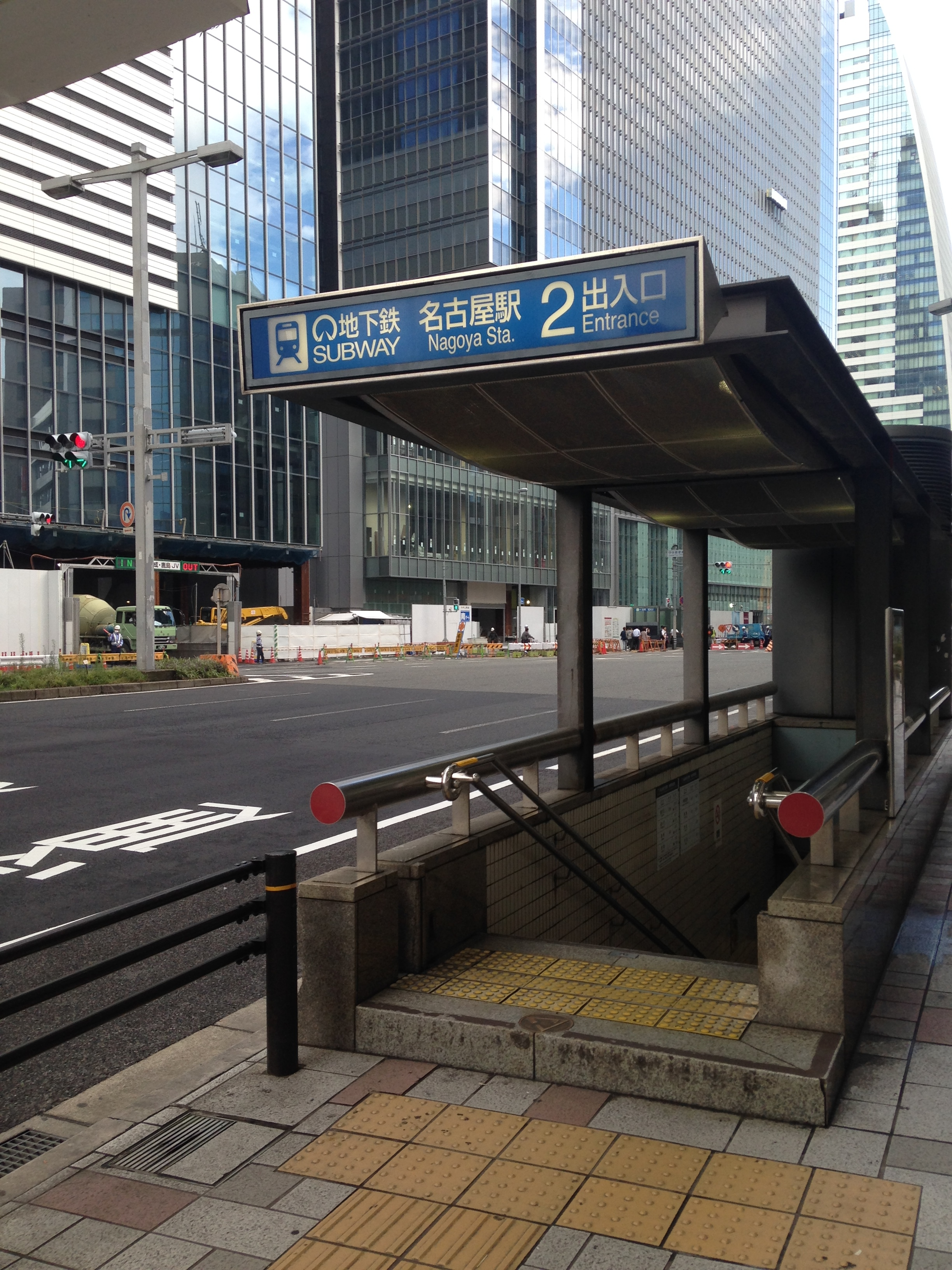 名古屋駅(名古屋市営地下鉄)の2番出入り口